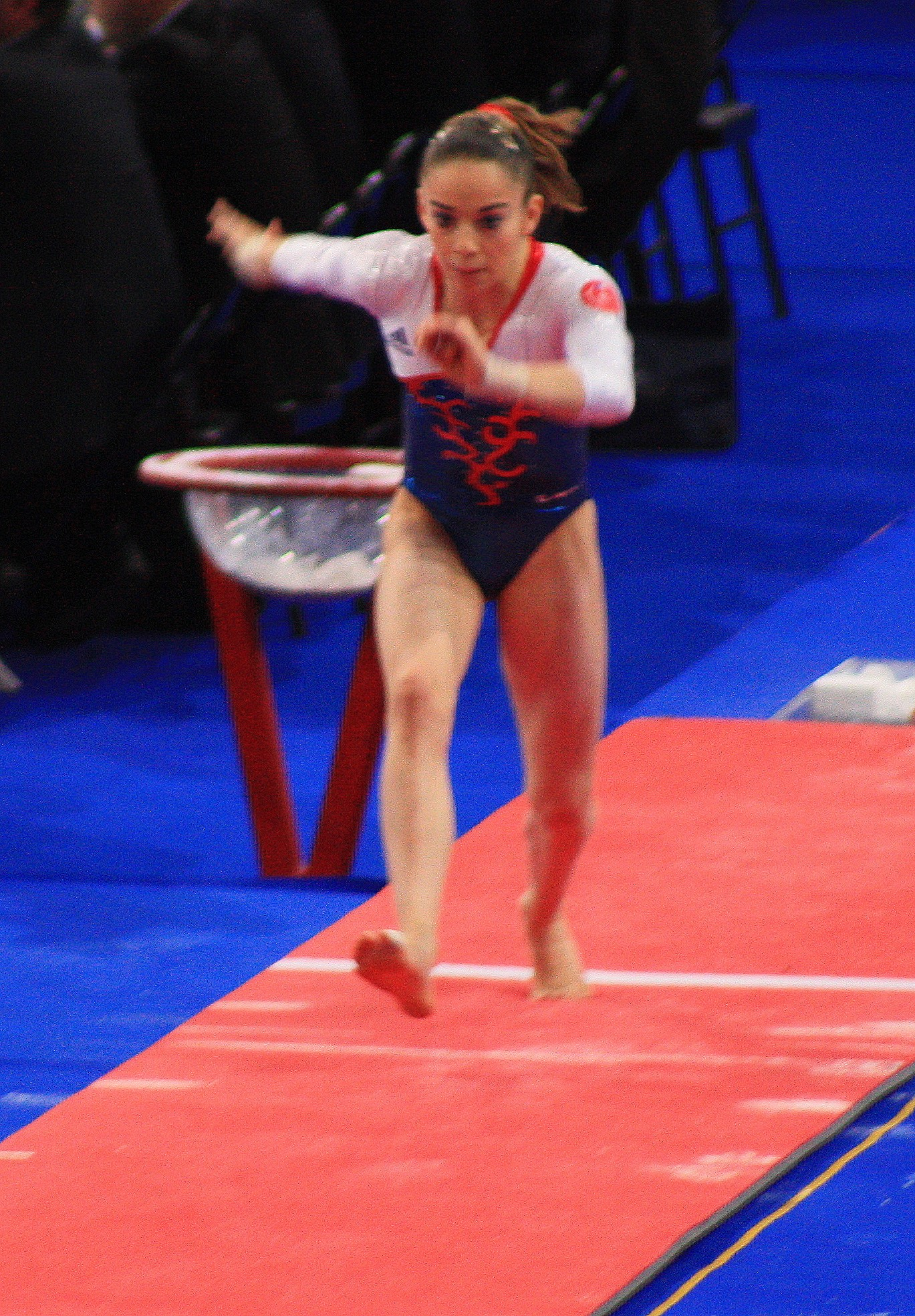 Youna Dufournet prend son élan en qualifications du saut de cheval, aux 17e Internationaux de France (2010).